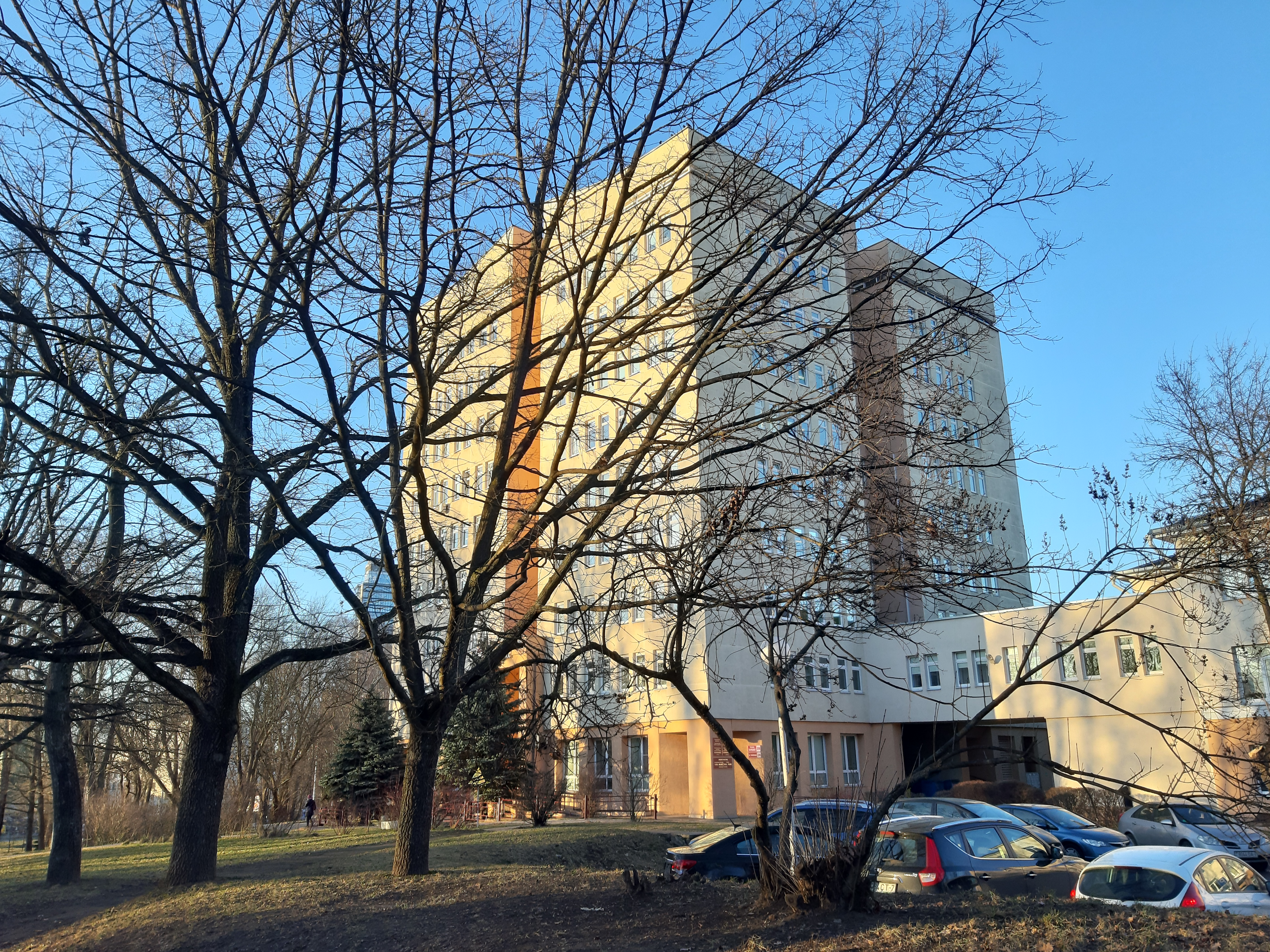 Мінск. Ад Маладзёжнай да Нямігі